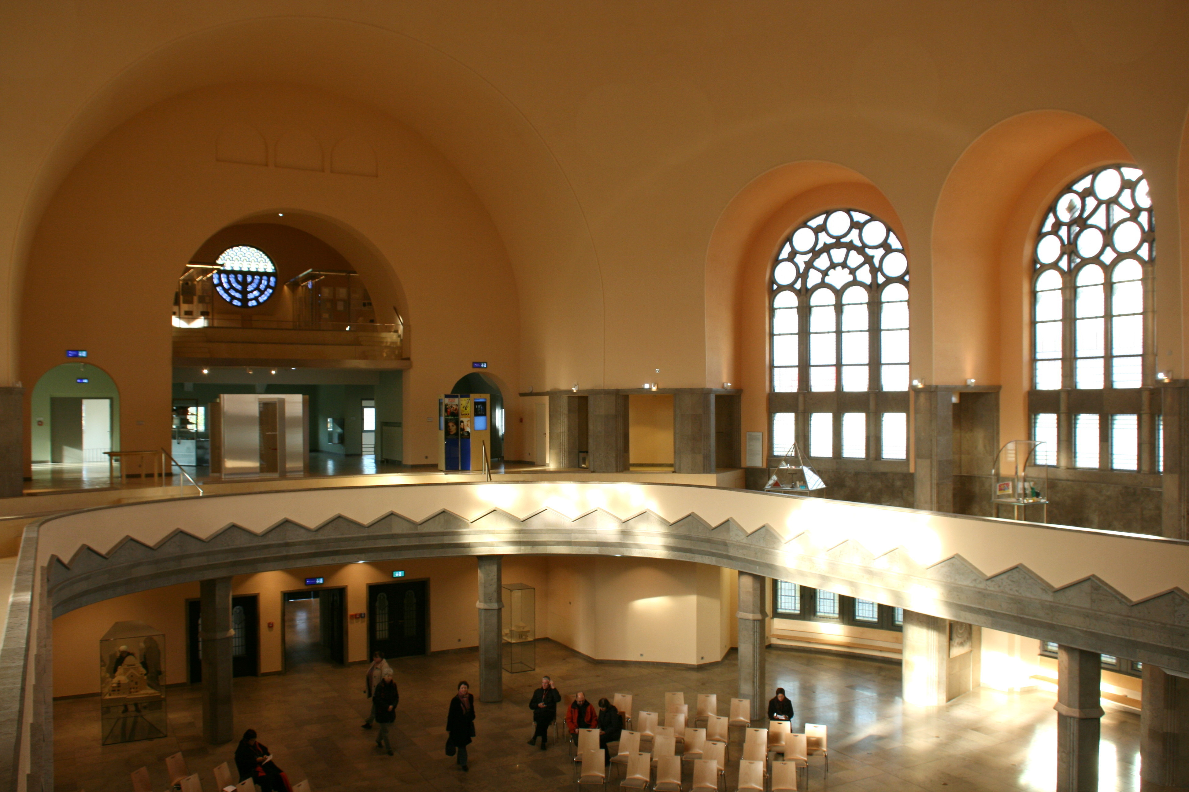 Alte Synagoge, Steeler Straße 29 in Essen